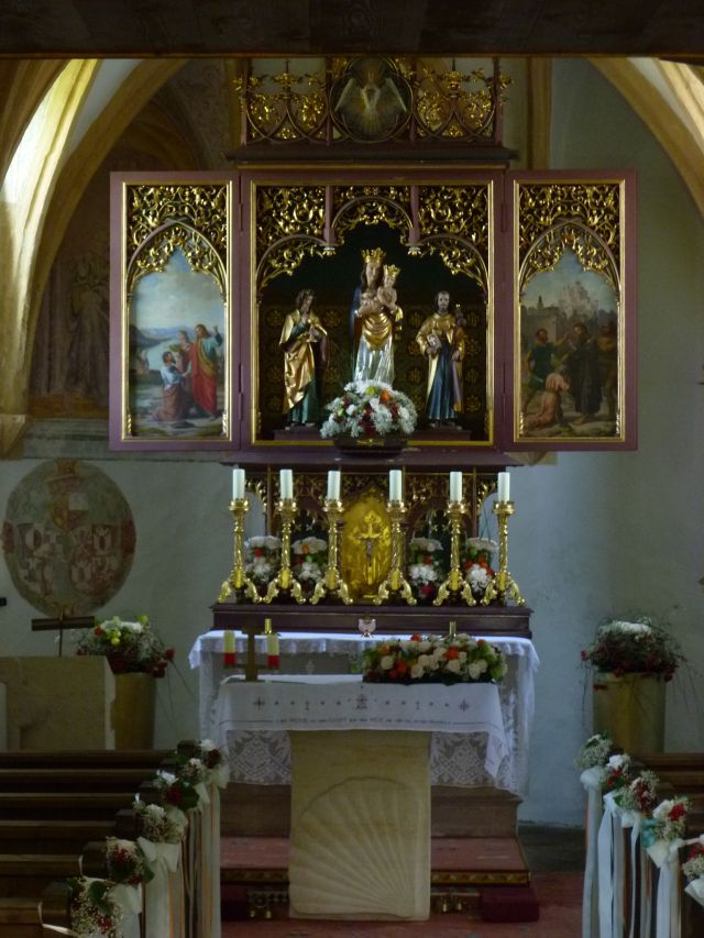 Altar der Filialkirche Gois